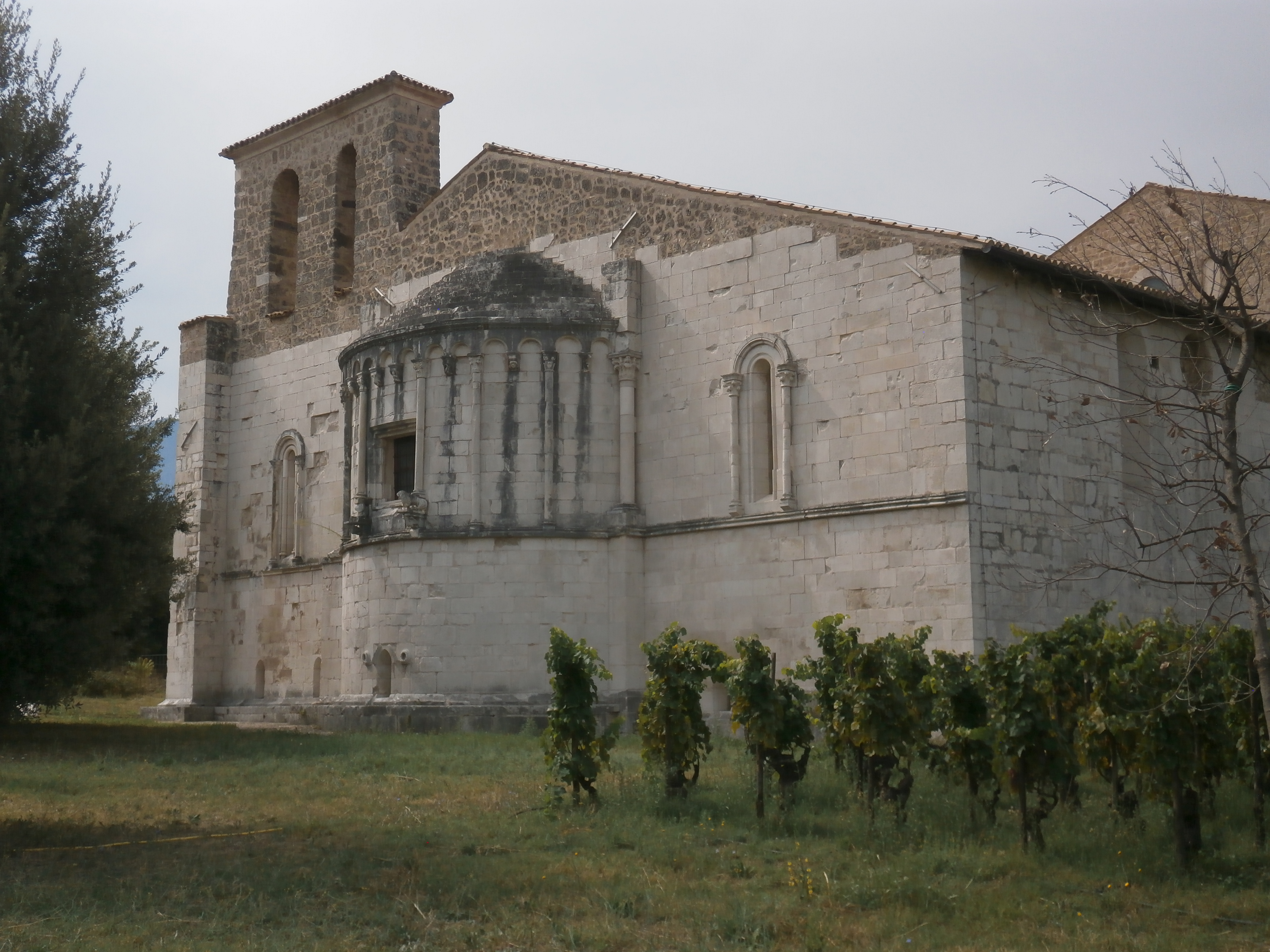 Abbazia di San Clemente a Casauria